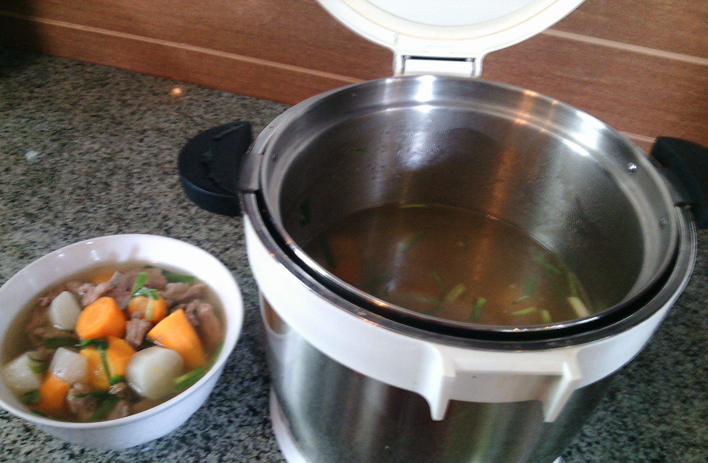 Nồi ủ giữ nhiệt chân không thực sự rất tuyệt vời khi dùng để nấu. Nồi ủ chân không giúp tiết kiệm tối đa thời gian và chi phí của bạn. Công nghệ chân không HB3200 được coi là đột phá mới, giúp tiết kiệm gấp 3 lần.